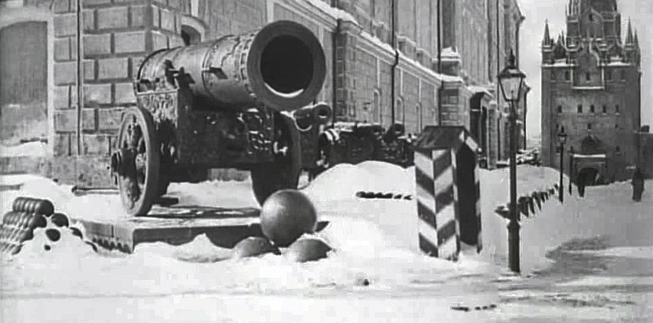 Вид на Никольскую башню от главных ворот здания Арсенала (Цейхгауза). Царь-пушка у главных ворот Арсенала, где она простояла с 18 века по 1960-е гг.